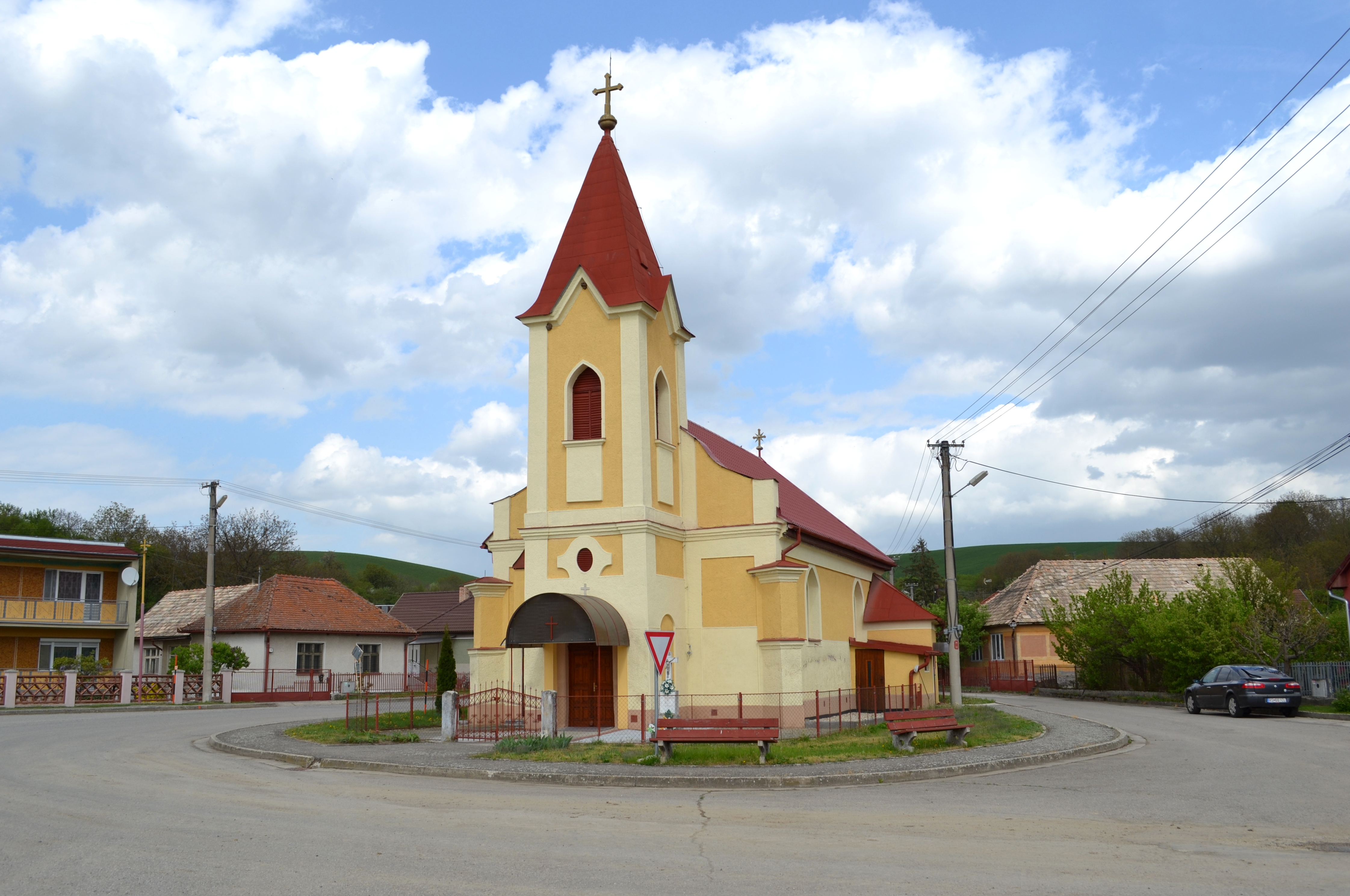 Dolné Zahorany, Kostol sv. Michala Archanjela